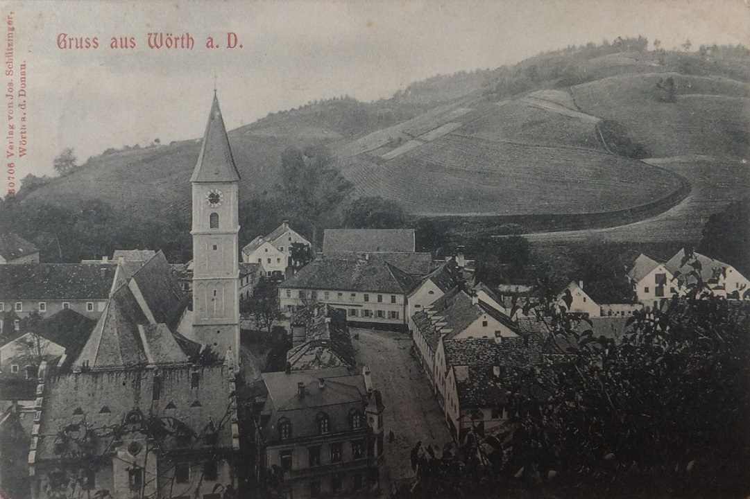 Wörth Donau Blick vom Schloss 1910